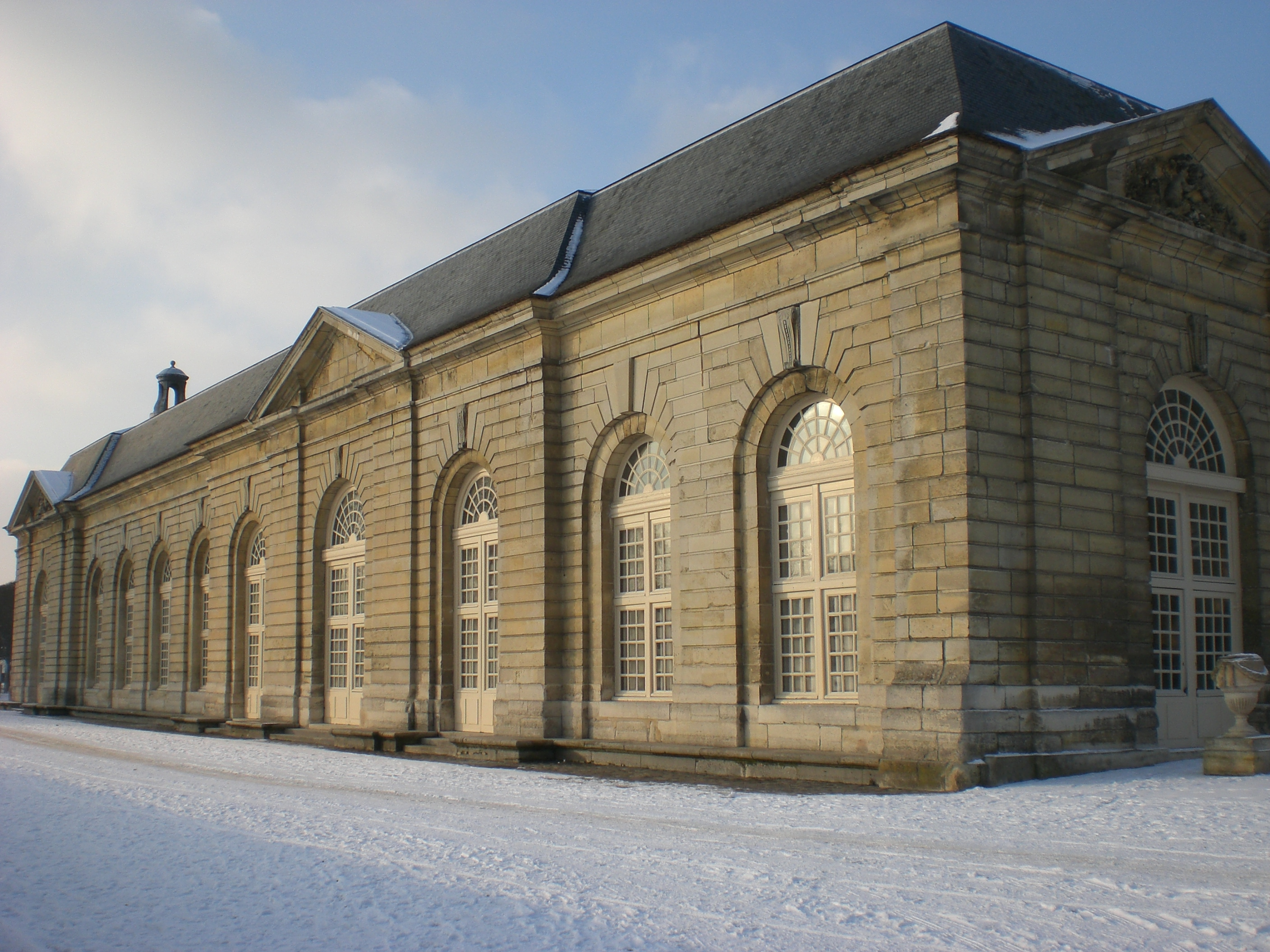 Sceaux, Parc de Le Nôtre, Orangerie, J.H.Mansart, 1684-86